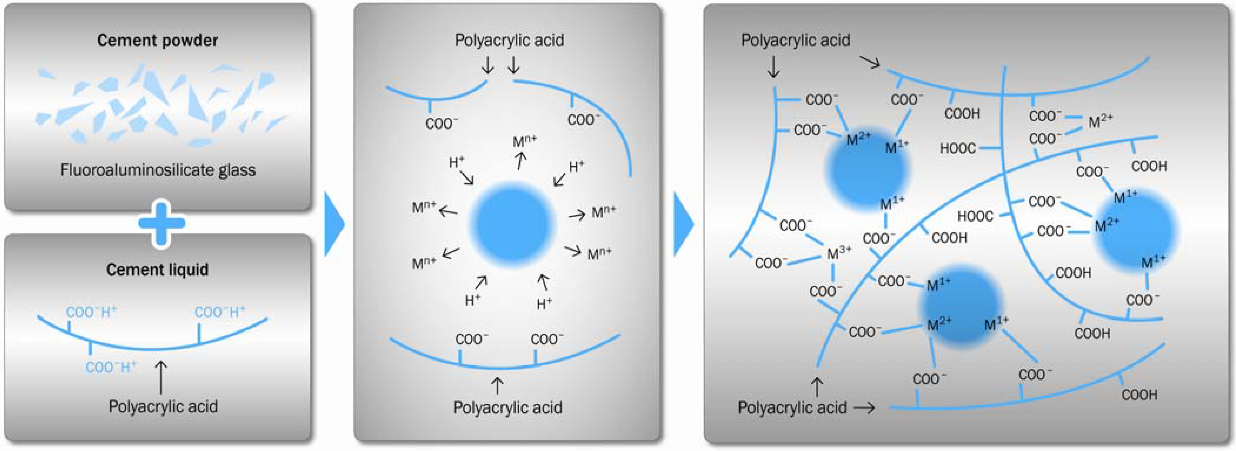 مراحل گیرش سیمان گلاس آیونومر